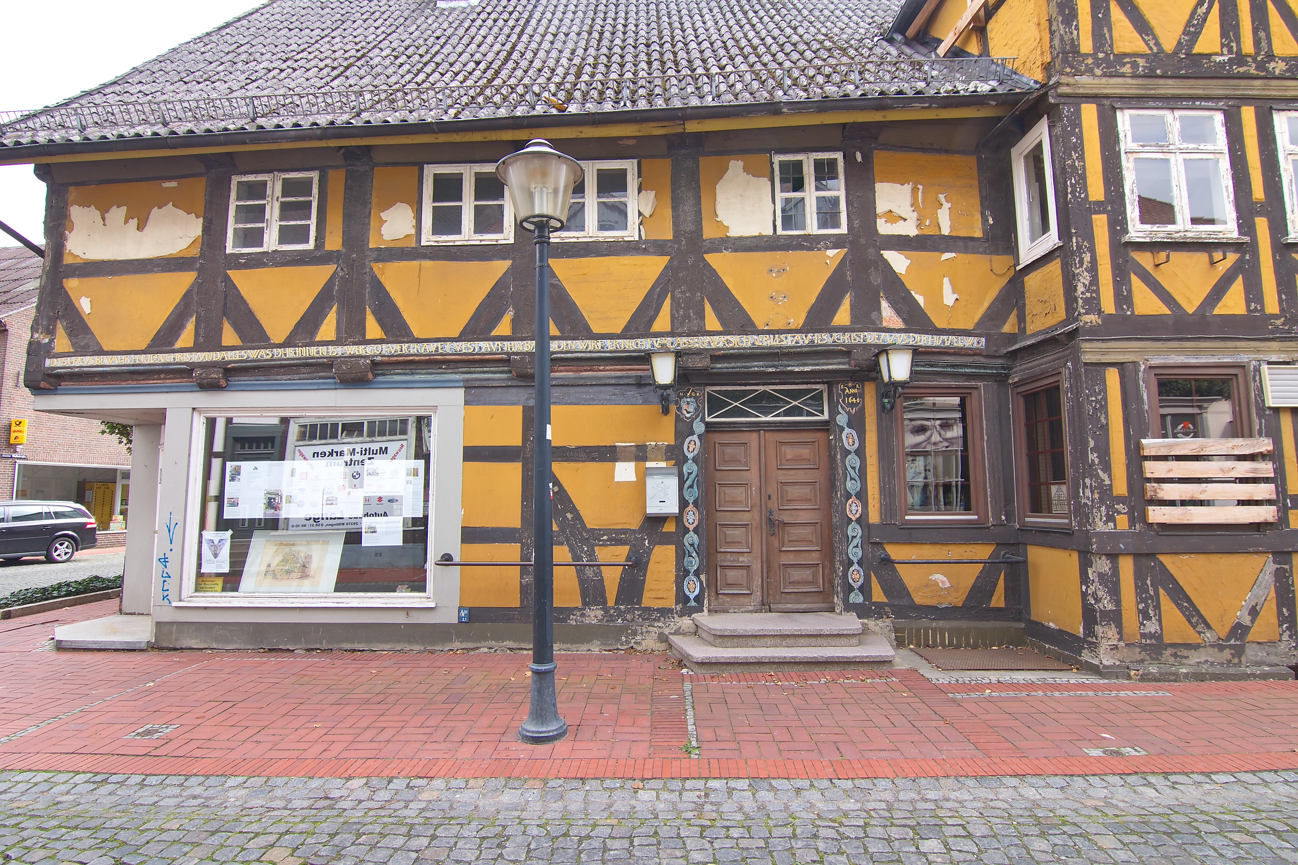 Das Haus Kreyenberg am ehemaligen Salzwedeler Tor (Klingentor) wurde 1640 nach einem Stadtbrand im 30jährigen Krieg errichtet.